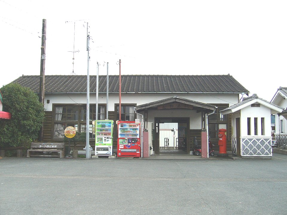 遠州森駅の駅舎